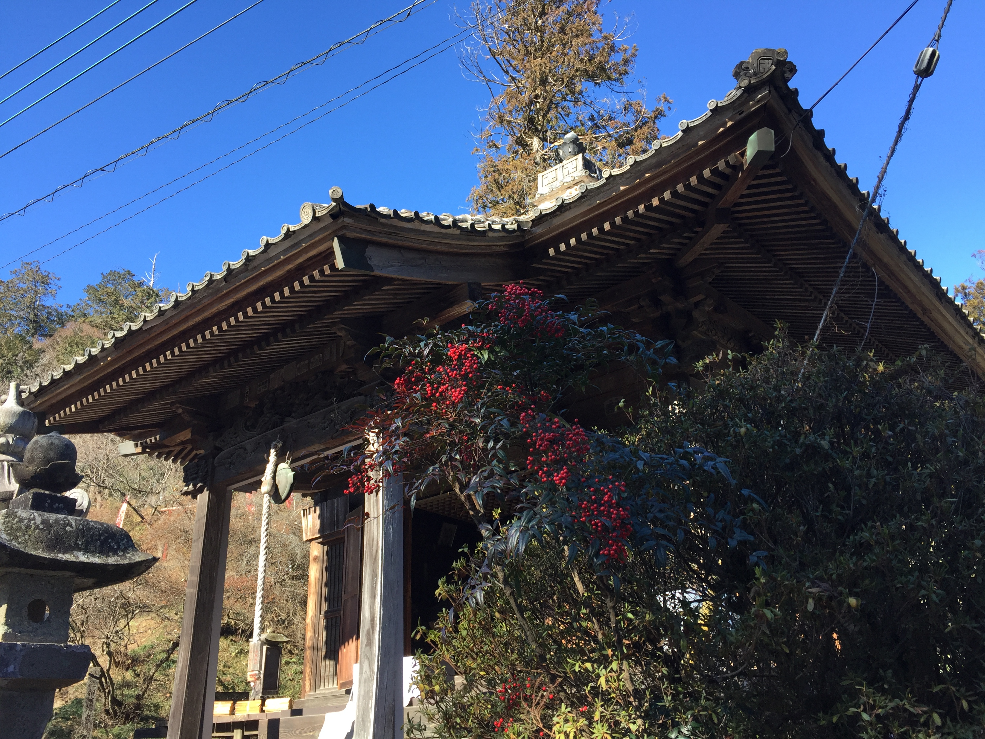 栃木県栃木市岩舟町小野寺の小野寺山大慈寺境内にある、慈覚大師堂。